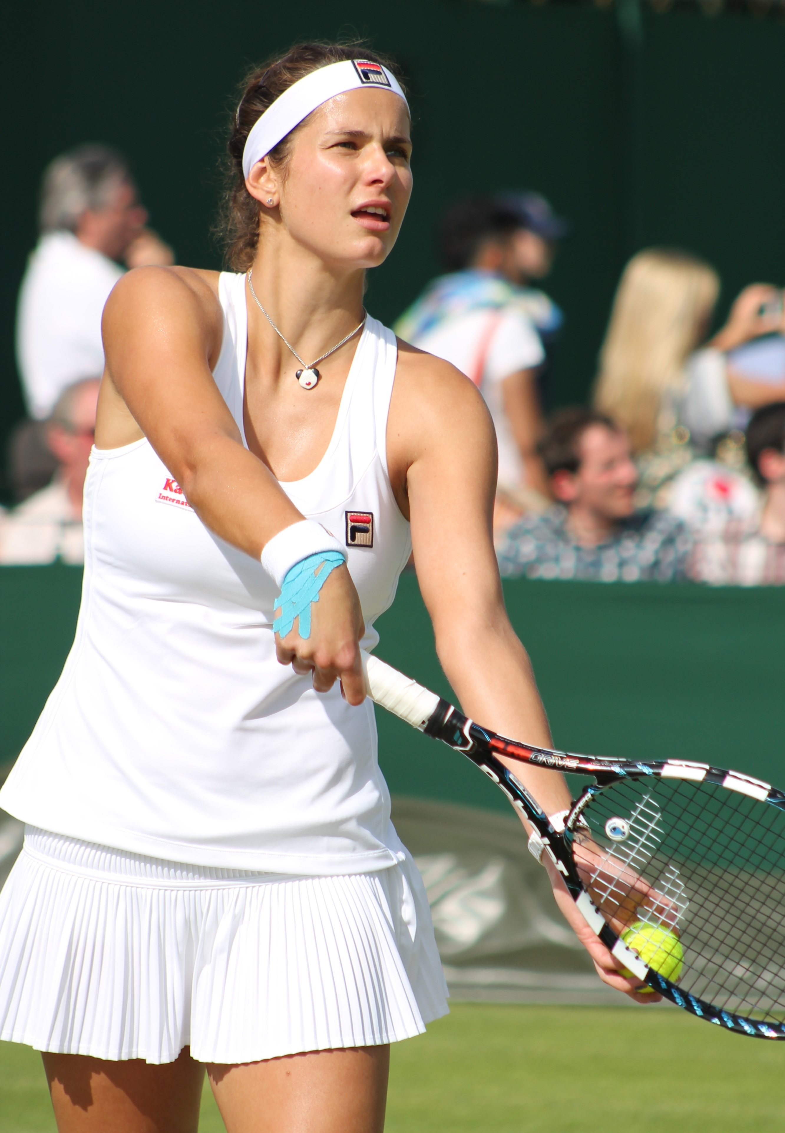 Goerges WM13-008